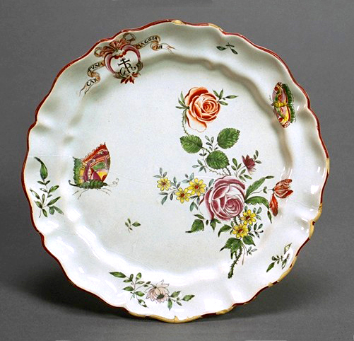 Piatto in maiolica decorato con il motivo "alla rosa". Pesaro, metà del XVIII secolo.